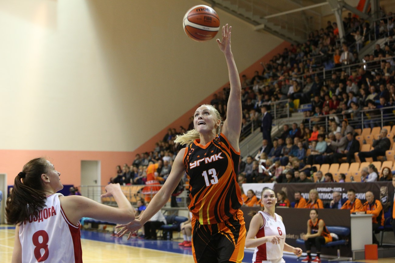 Беглова, Елена Николаевна